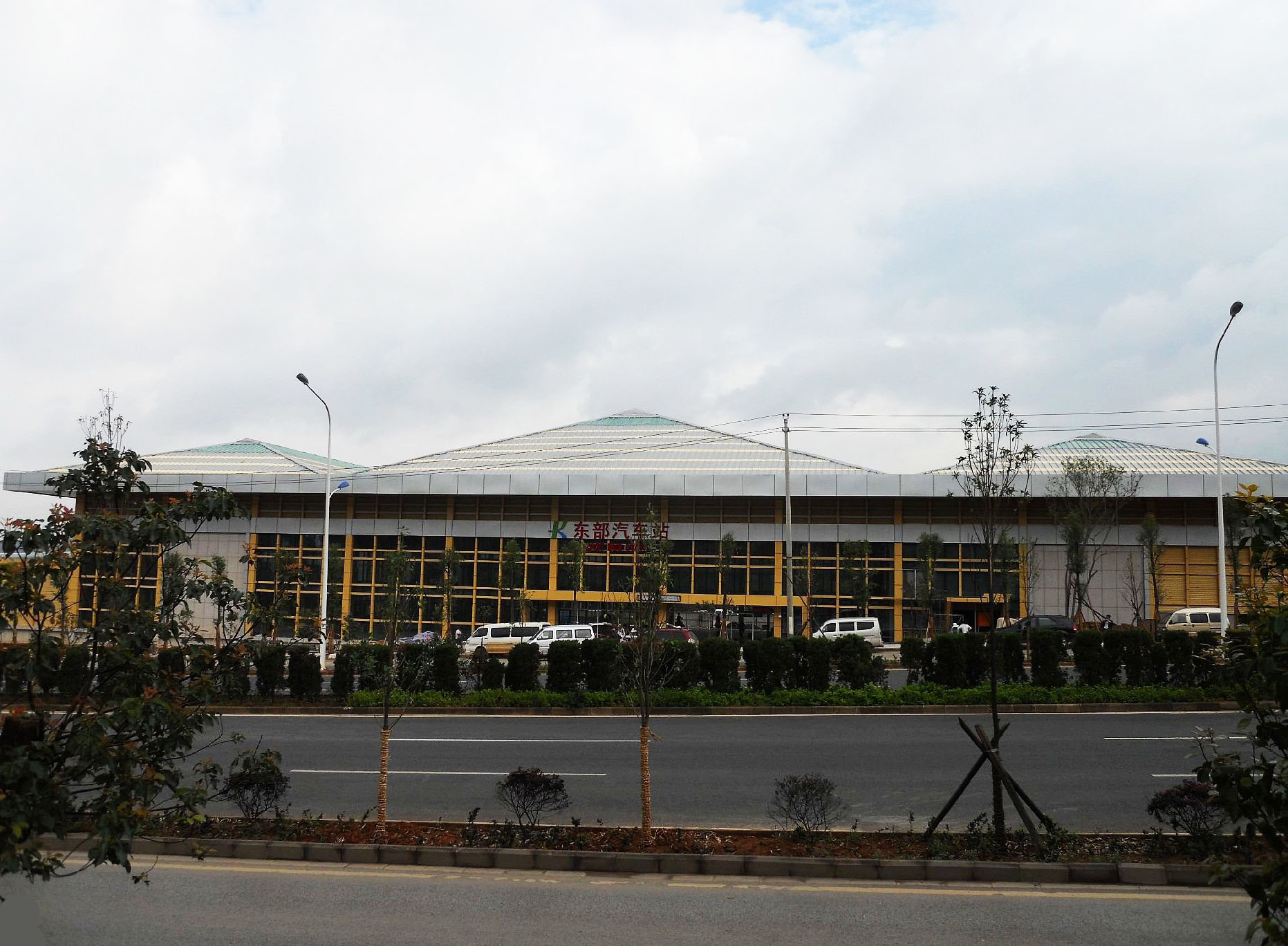 东部汽车站站外部